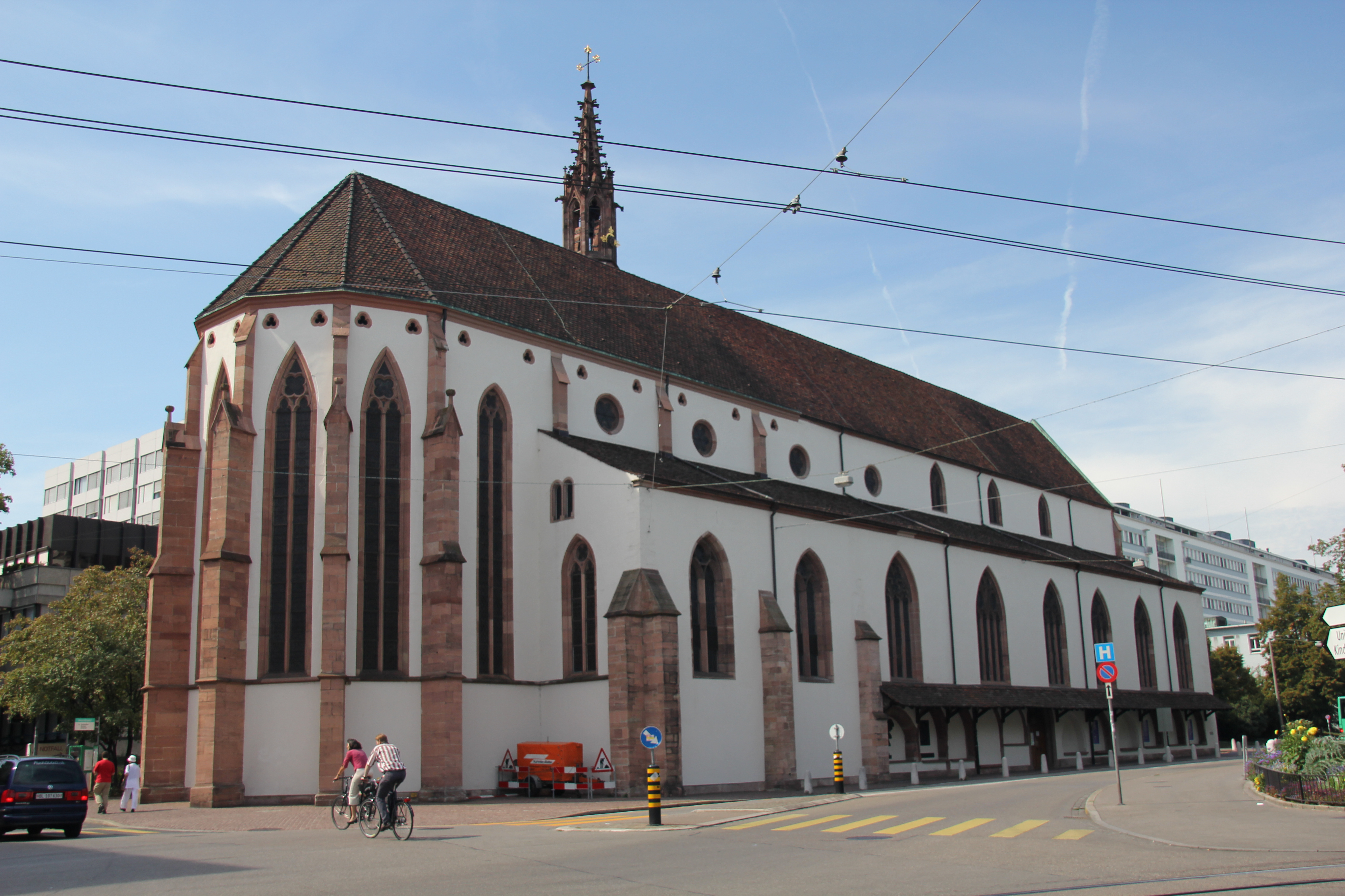 Altkatholische Predigerkirche Basel